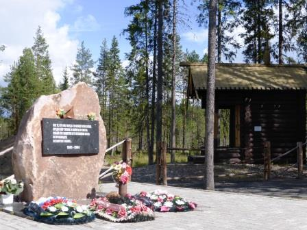 Мемориальный комплекс «Курган Славы» в Пряжинском районе Карелии на 39-м км автодороги Петрозаводск-Суоярви. Здесь захоронено 773 воина Карельского фронта, погибших в годы Советско-финской войны (1941—1944).